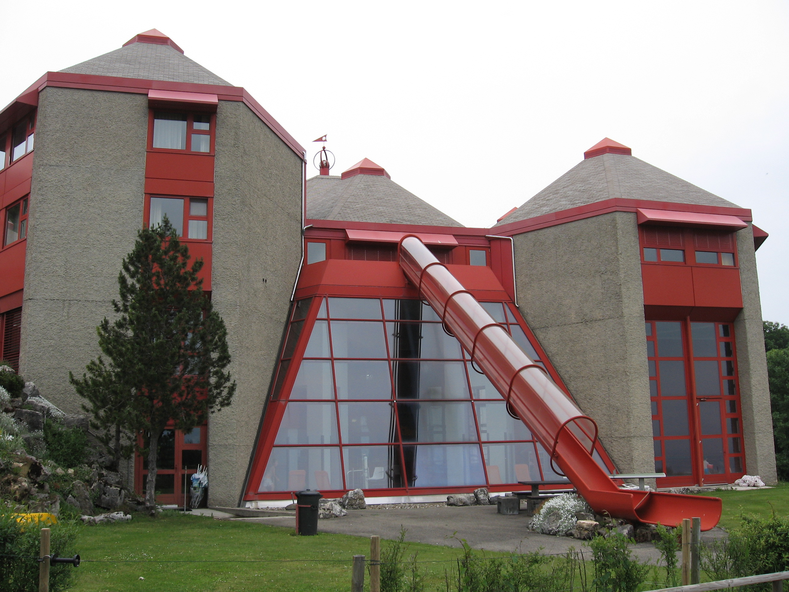 Feriendorf Twannberg, Schweiz (Grand Prix d'Architecture 1981), Architekt Justus Dahinden